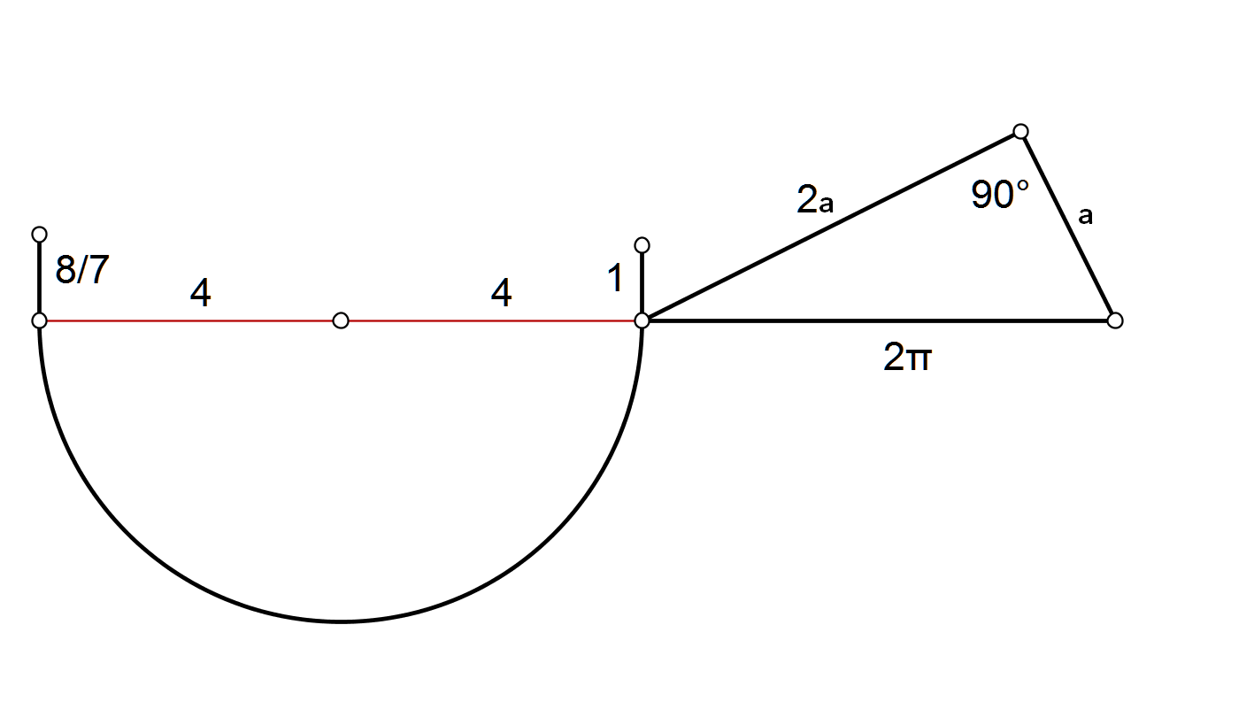 Konstruktionsschema des idealen Sad nach Ibn Muqla